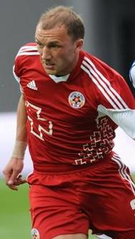 Сергій Сімінін під час виступів за Волинь